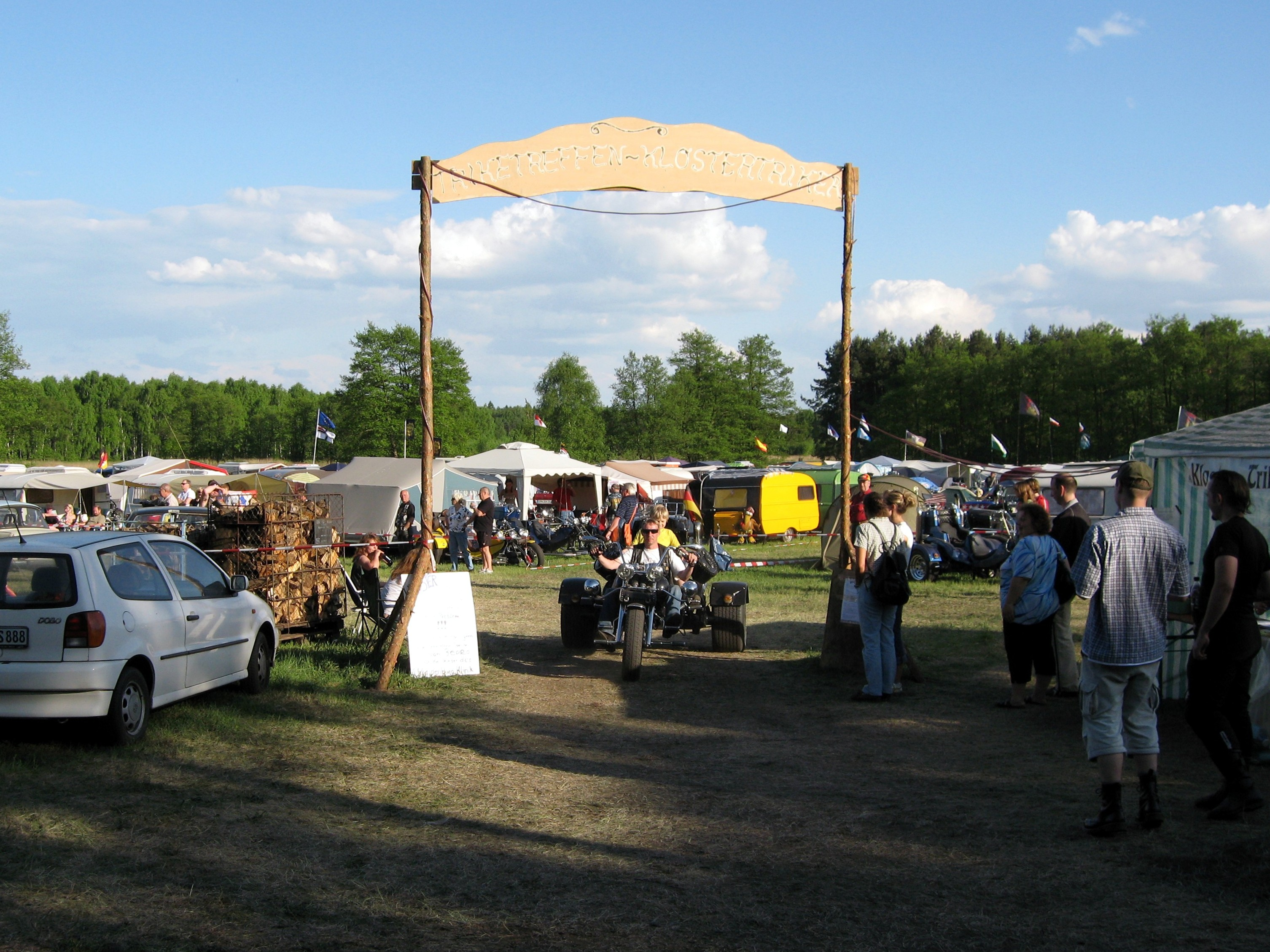 4. Triketreffen Klosterfelde, Pfingsten 9. - 12. Mai 2008, Gemeinde Wandlitz, Landkreis Barnim, Land Brandenburg, Deutschland